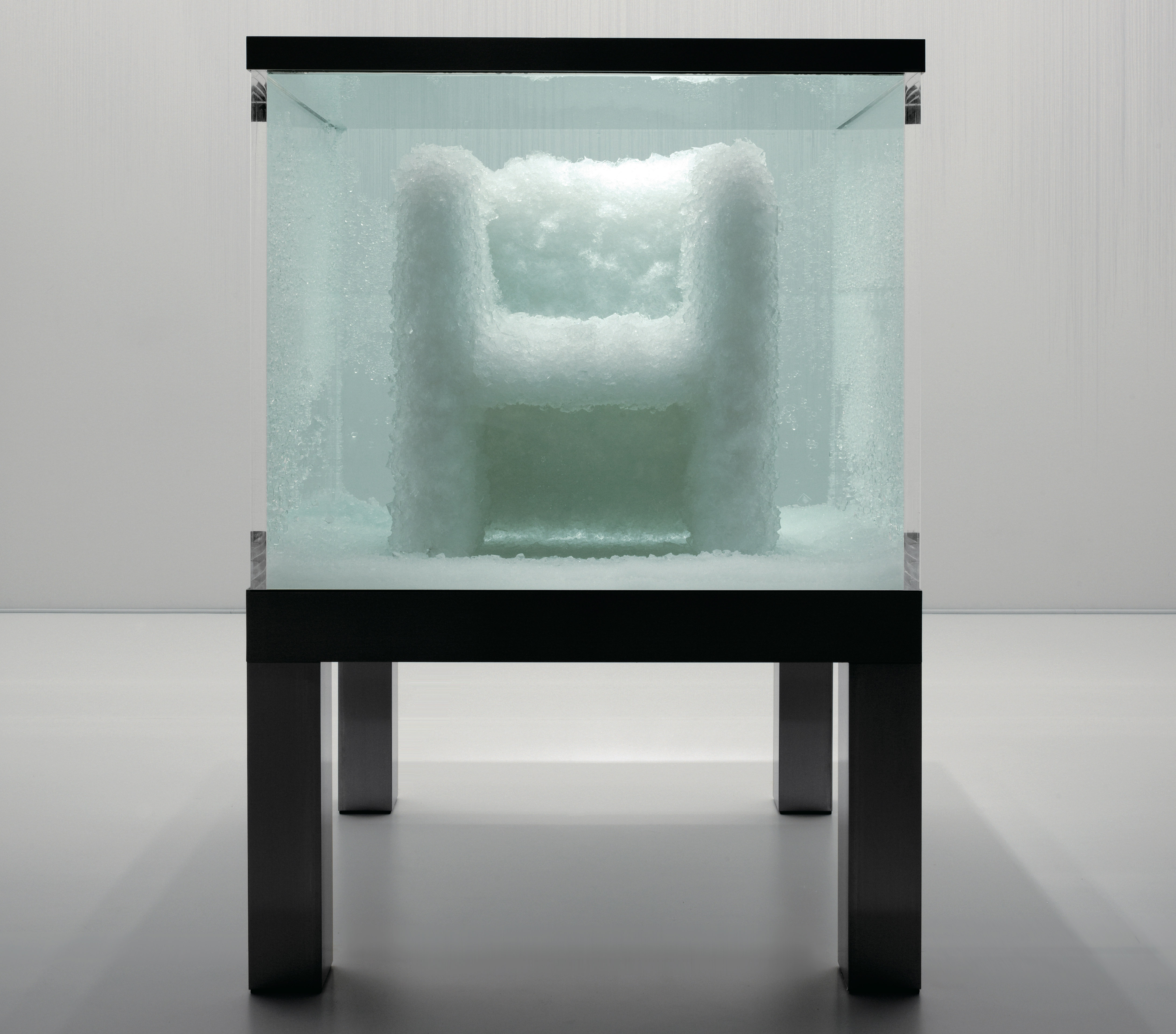 VENUS